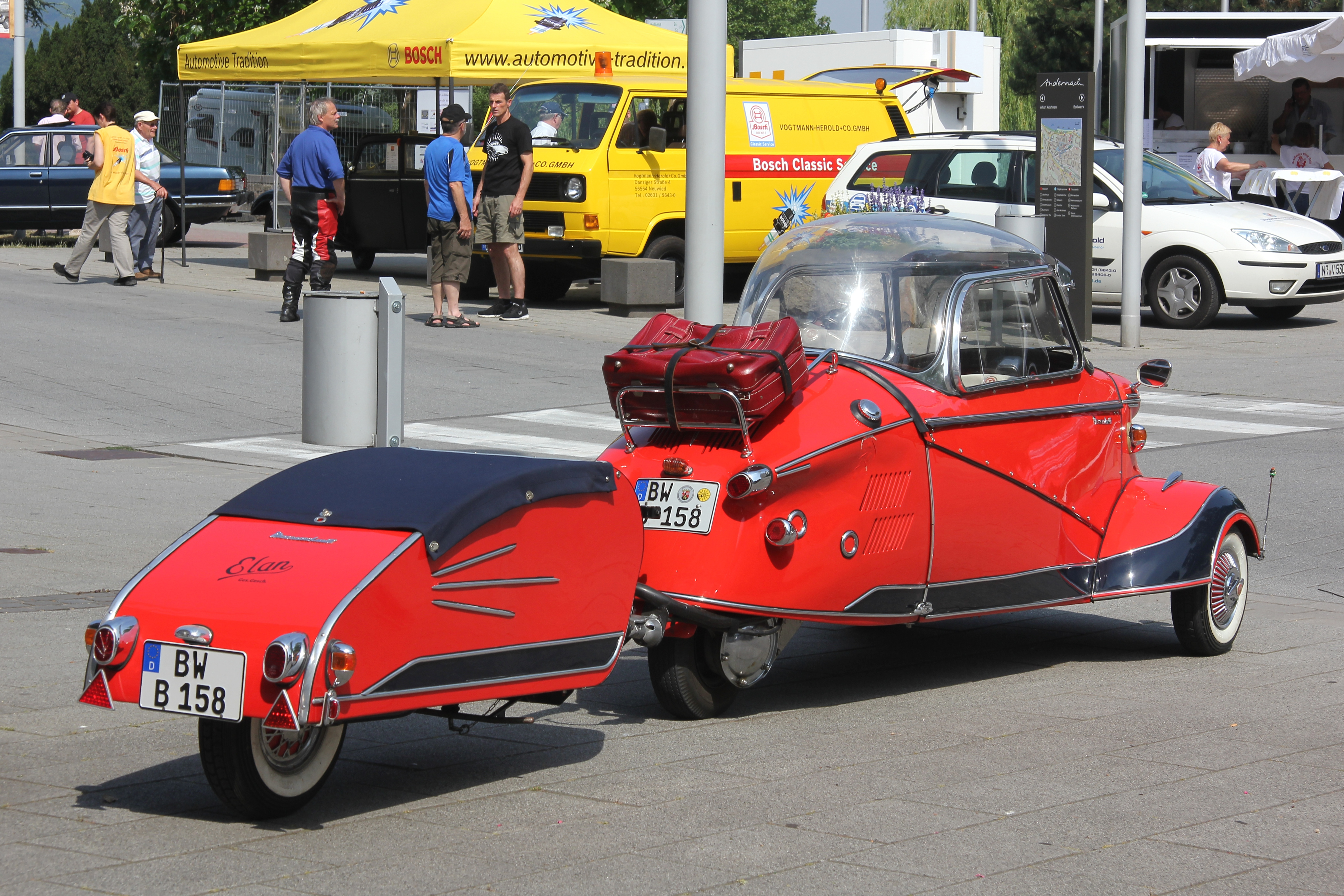 Messerschmitt KR 200, Baujahr 1955, 1-Zylinder-Zweitaktmotor, 191 cm³, 10,2 PS bei 5250/min, Höchstgeschwindigkeit ca. 100 km/h; mit Anhänger „Elan“ von Vögtle & Zeller, Freiburg (Kennzeichen des Fahrzeugs verändert)